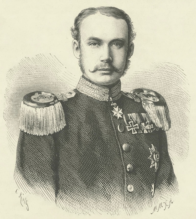 Todesnachricht Großherzog Friedrich Franz des II. zu Mecklenburg , Mitteilung der Übernahme der Regentschaft durch Erbgroßherzog Friedrich Franz III..